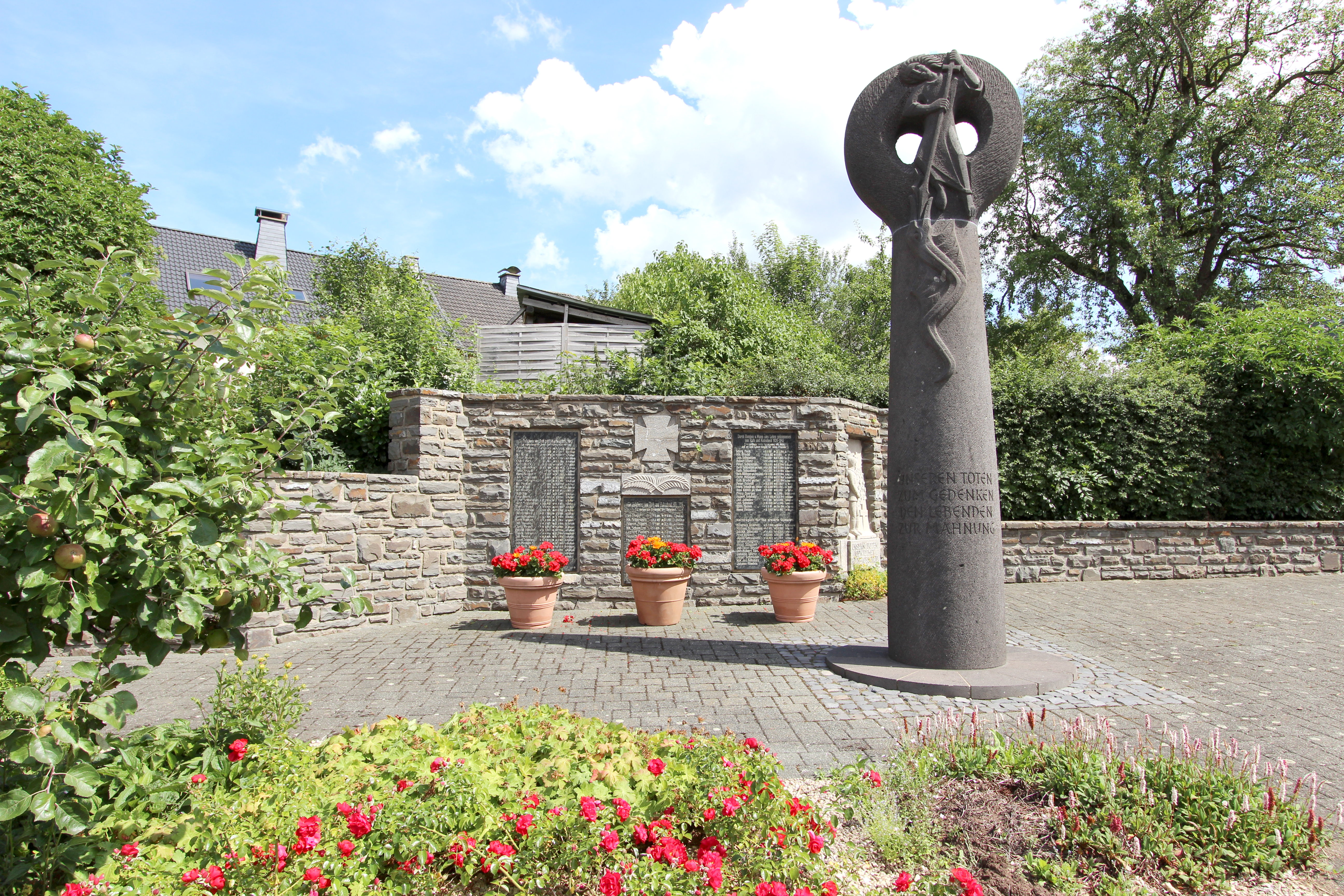 54597 Roth bei Prüm. Gedenkstätte an der Ecke Hauptstraße und Kobscheider Straße. Aufnahme von 2017.